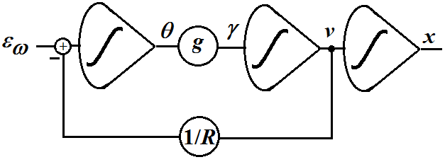 ErrorPropagationWithSchuler